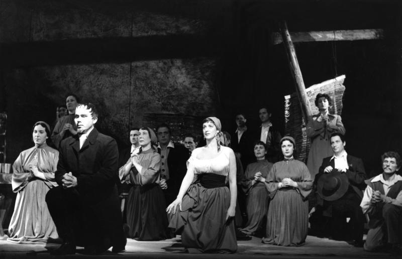 20.11.1954 "Die Macht des Schicksals" (Oper) von Verdi im Stadttheater Bonn